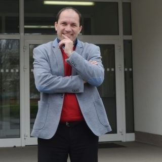 Poslanec Mgr. Marek Výborný